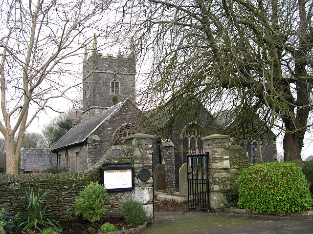 St Budeaux Church